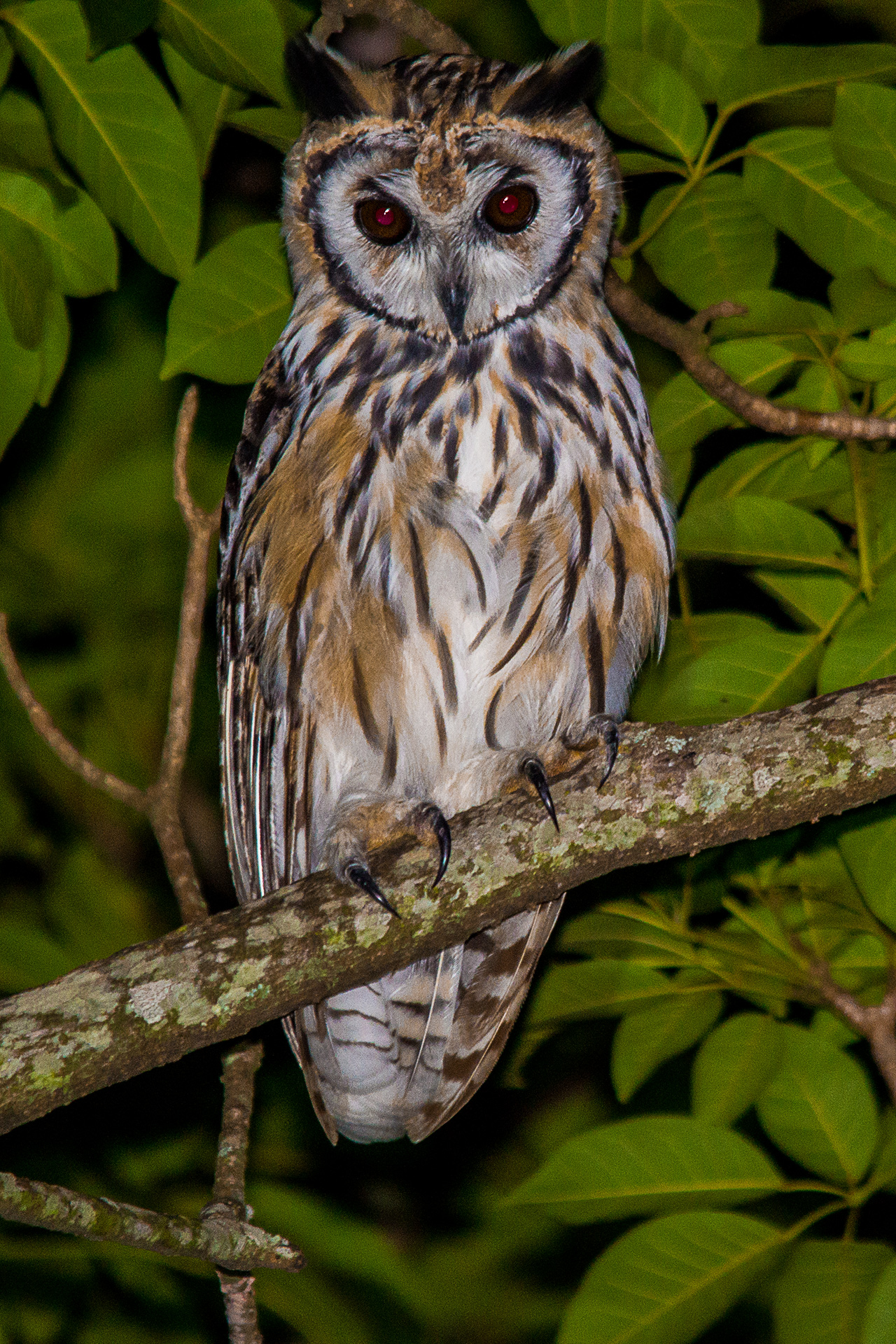 Foto realizada em uma mata próxima à cidade de Limeira em São Paulo no dia 18/01/2016, por volta das 24:00 hs; no momento da captura da imagem a ave caçava nos arredores. Nome Cientifico: Pseudoscops clamator'. Nome Inglês: Striped Owl. Ave de hábitos noturnos cuja alimentação constitui-se basicamente de ratos, anfíbios morcegos, répteis, insetos grandes e até mesmo outras aves, é uma rapinante comum em áreas abertas, campos, cerrados e até cidade. É encontrada em todo território nacional , Venezuela, Bolívia, Paraguai, Argentina e Uruguai.